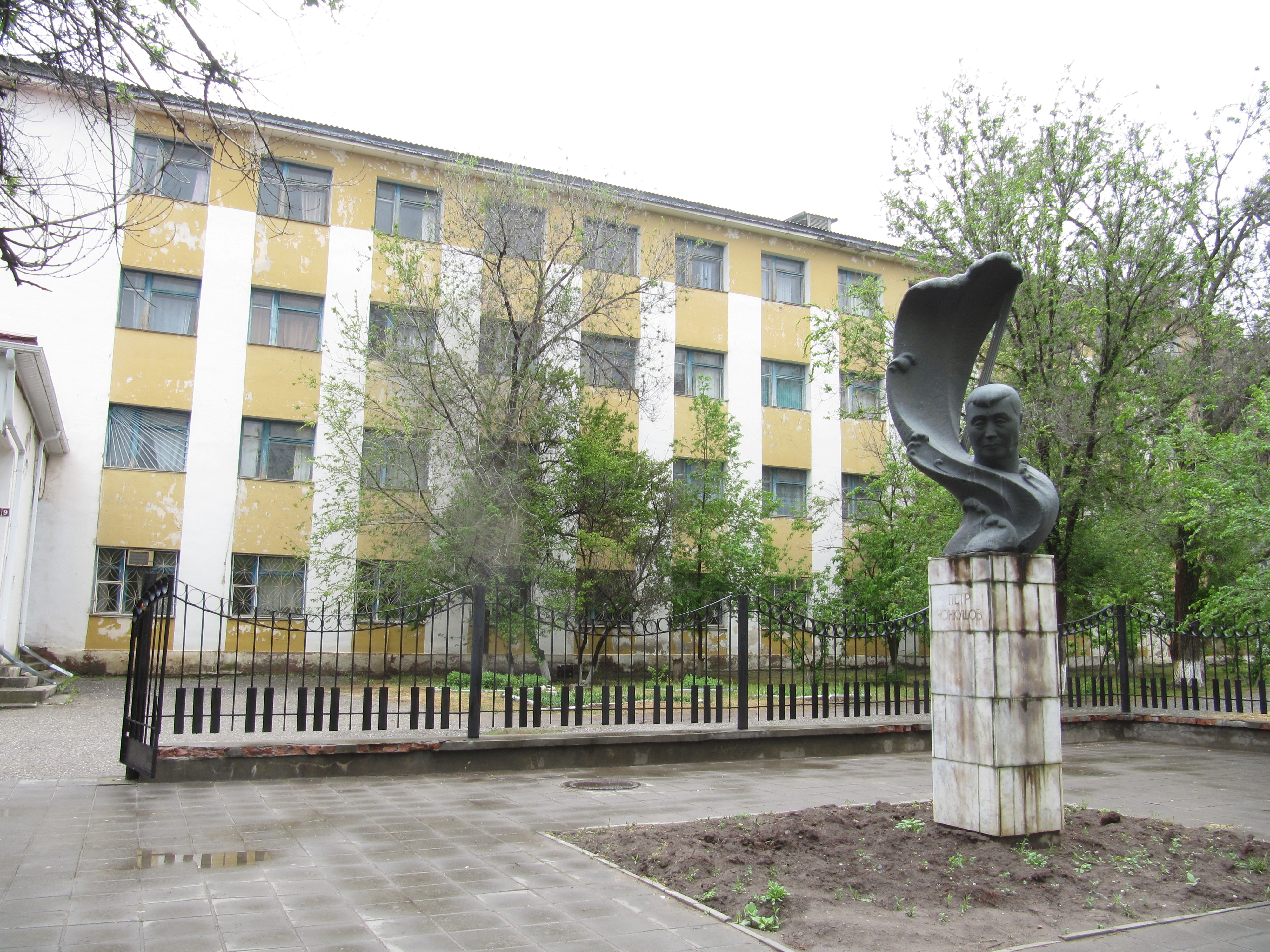 Школа искусств имени Чонкушова, Элиста